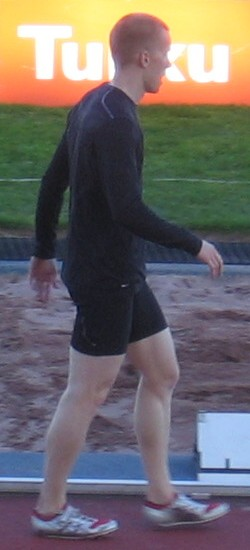 Eetu Viitala Paavo Nurmen kisoissa, Paavo Nurmen stadionilla, Turussa, 24. kesäkuuta 2009